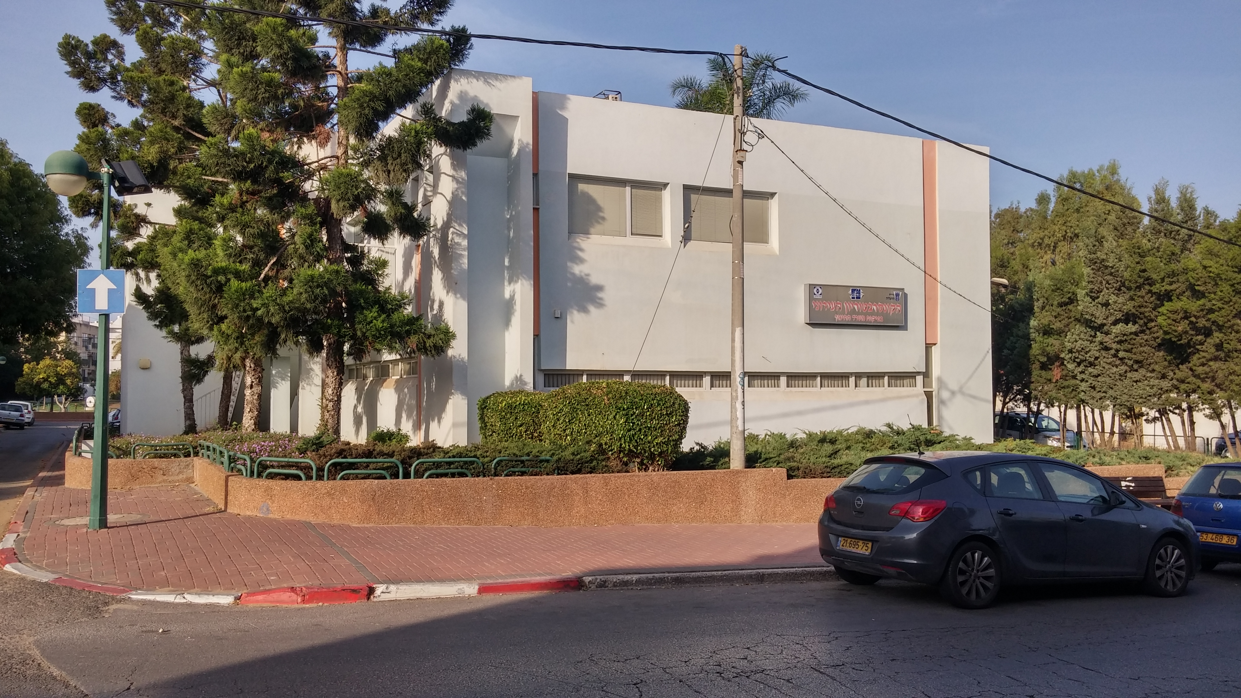 הקונסרבטוריון העירוני, הרצליה